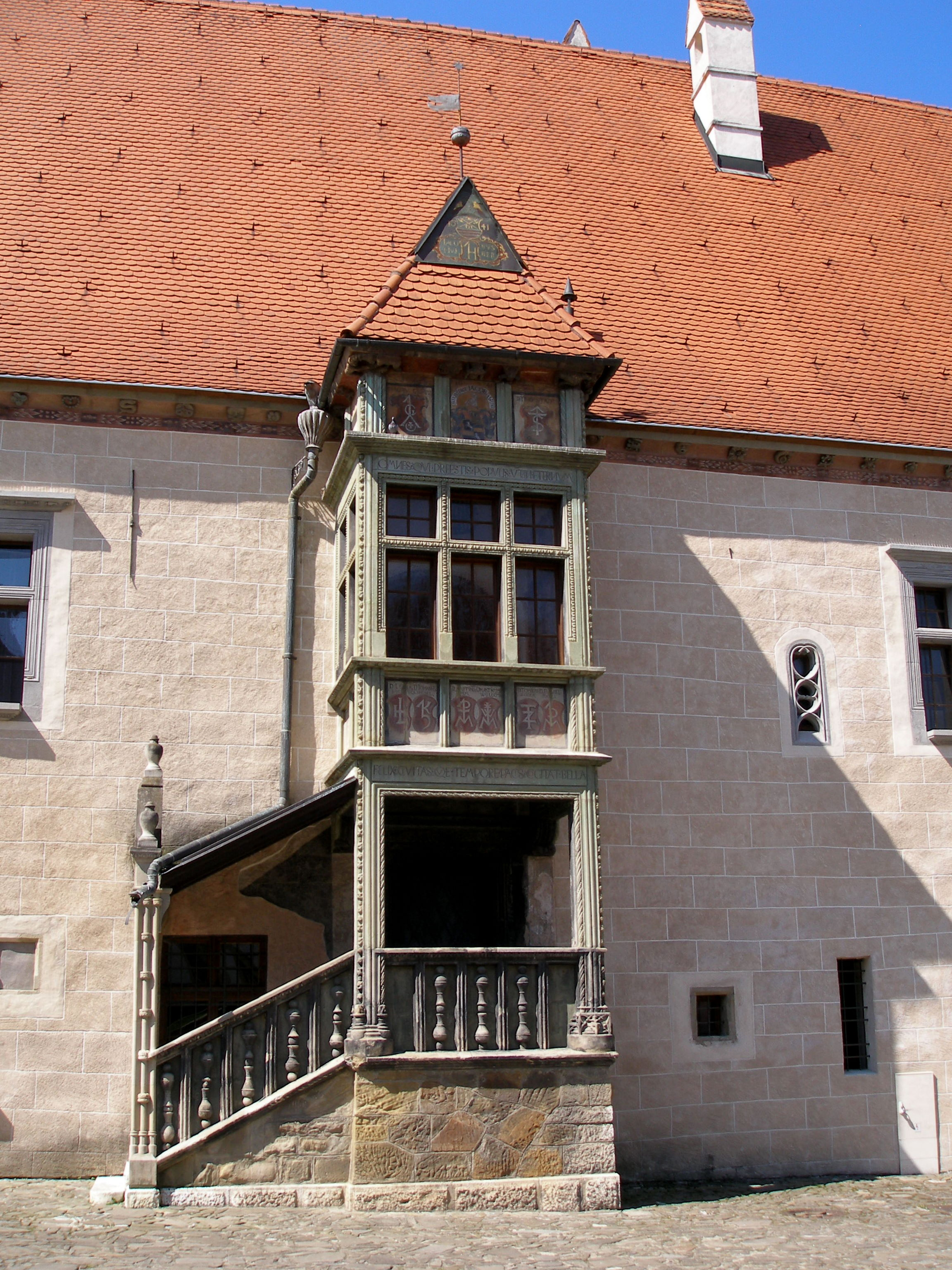 Renesančno-gotické námestie, starobylé námestie obdĺžnikového tvaru má rozlohu 260x80 metrov. V jeho strede sa nachádza architektonický skvost - Mestská radnica. Námestie je obkolesené z troch strán 46-timi poschodovými meštianskymi domami, postavenými na typických úzkych stredovekých parcelách, kolmých na námestie. Do námestia sú orientované všetky významné ulice historického jadra. Dlažbu námestia tvorili pôvodne mačacie hlavy. Môžete ich tu vidieť i dnes. Námestie Bardejova bolo v stredoveku trhovým námestím - konali sa na ňom jarmoky. Najvýznamnejšou pamiatkou námestia je rímskokatolícka Bazilika svätého Egídia, stojacia v jeho severnej časti. Začali ju stavať začiatkom 15. storočia a postupne dostala podobu veľkolepej gotickej baziliky s tromi loďami. V interiéri zaujme súbor 11 neskorogotických oltárov z 15. a 16. storočia, z ktorých niektoré plastiky sa považujú za vrcholné európske rezbárske práce. This medium shows the protected monument with the number 701-1677/0 in the Slovak Republic.